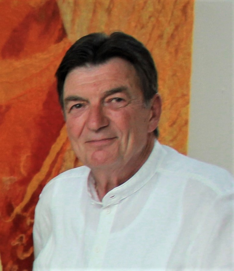 Der Schweizer Bio-Baumwollunternehmer Patrick Hohmann als Gast an einer Kunstvernissage.